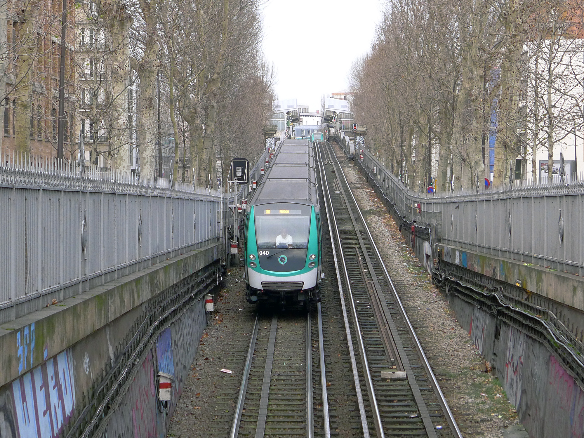 Métro de la ligne 2 arrivant à la station Colonel-Fabien - Paris XIX